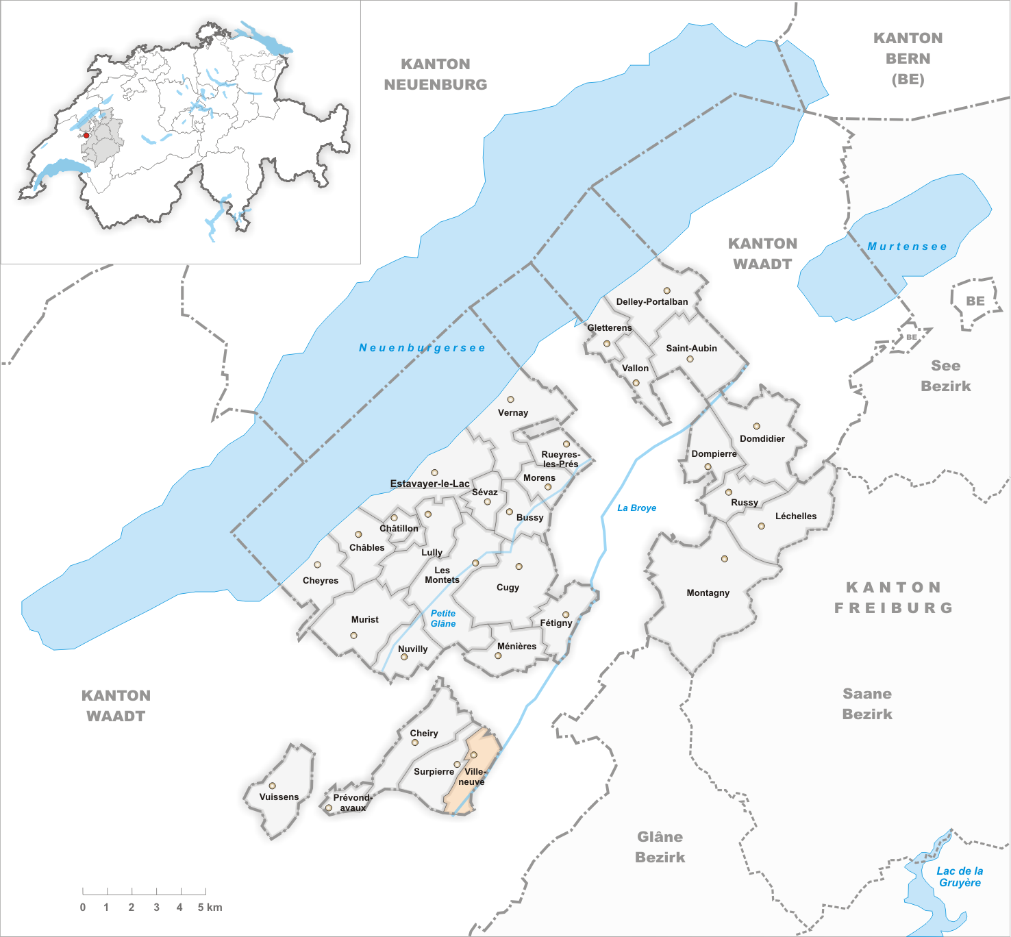 Municipality Villeneuve